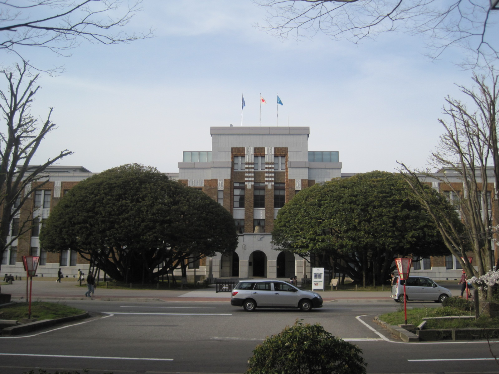 石川県政記念しいのき迎賓館と天然記念物に指定されている「堂形のシイノキ」（石川県金沢市）